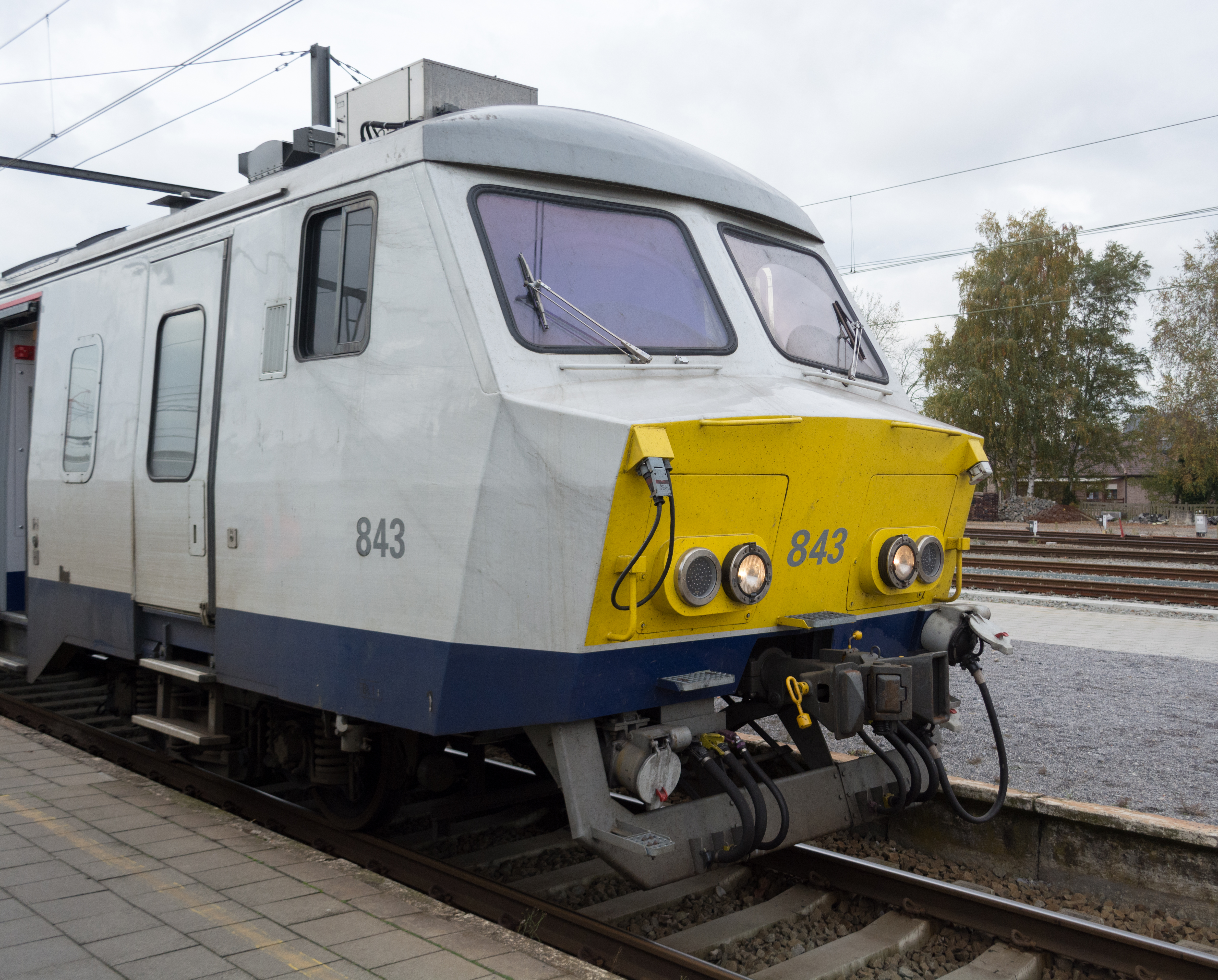 AM75 Série 800 SNCB